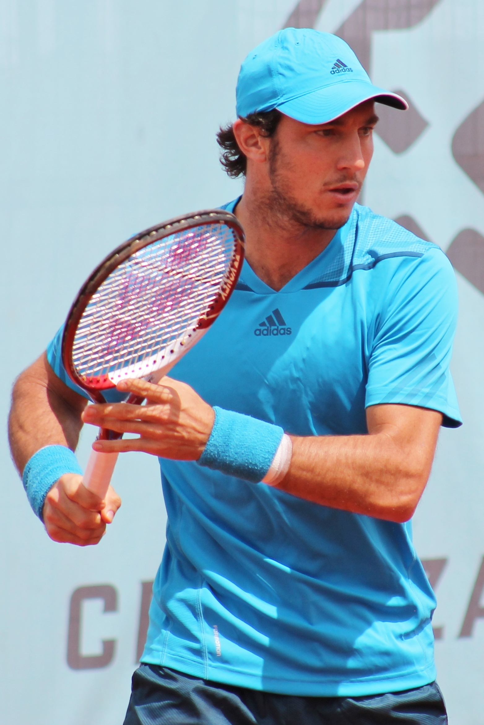 Monaco MA14 (16) - Copy